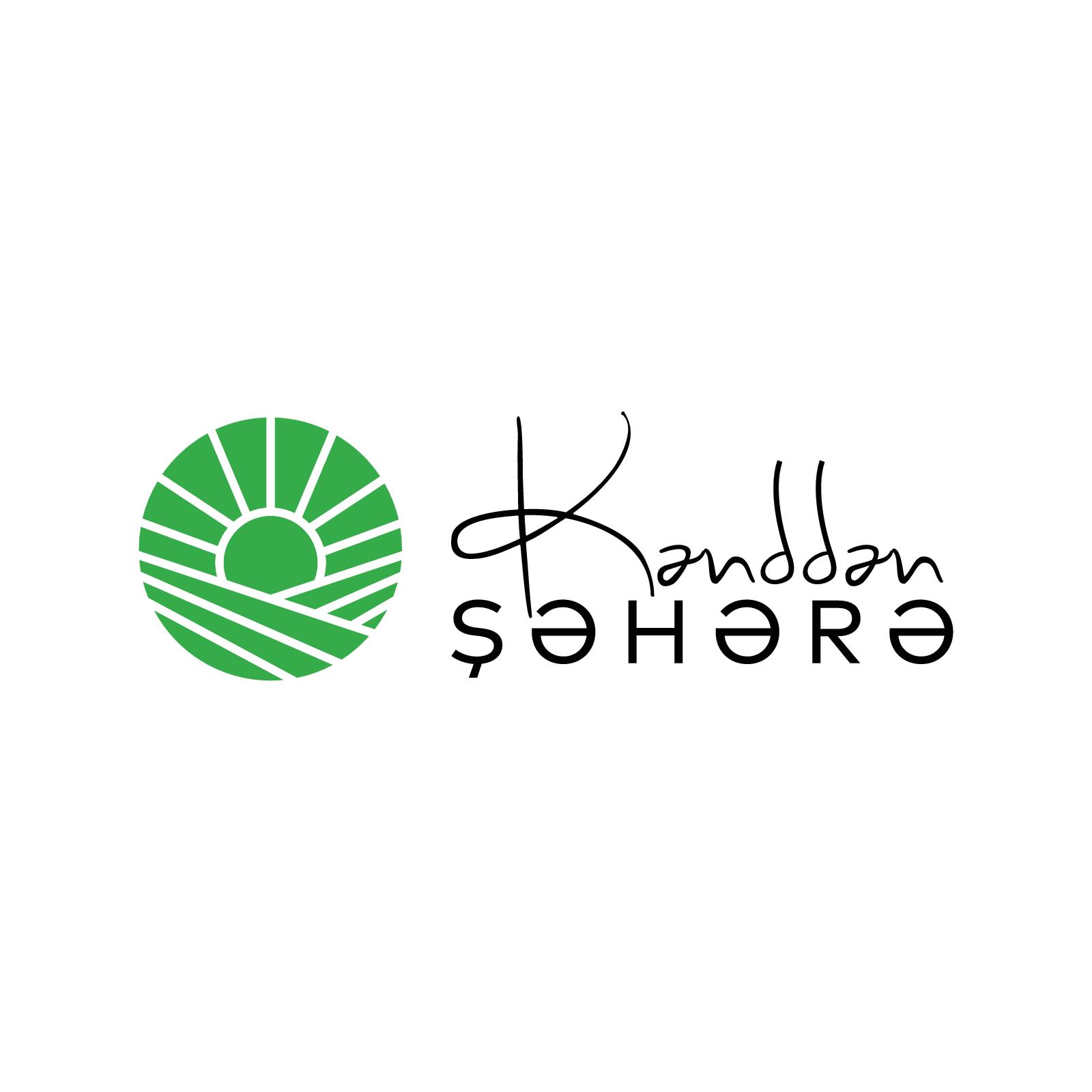 Kənddən Şəhərə